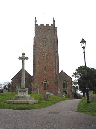 St. Michael's church, Milverton